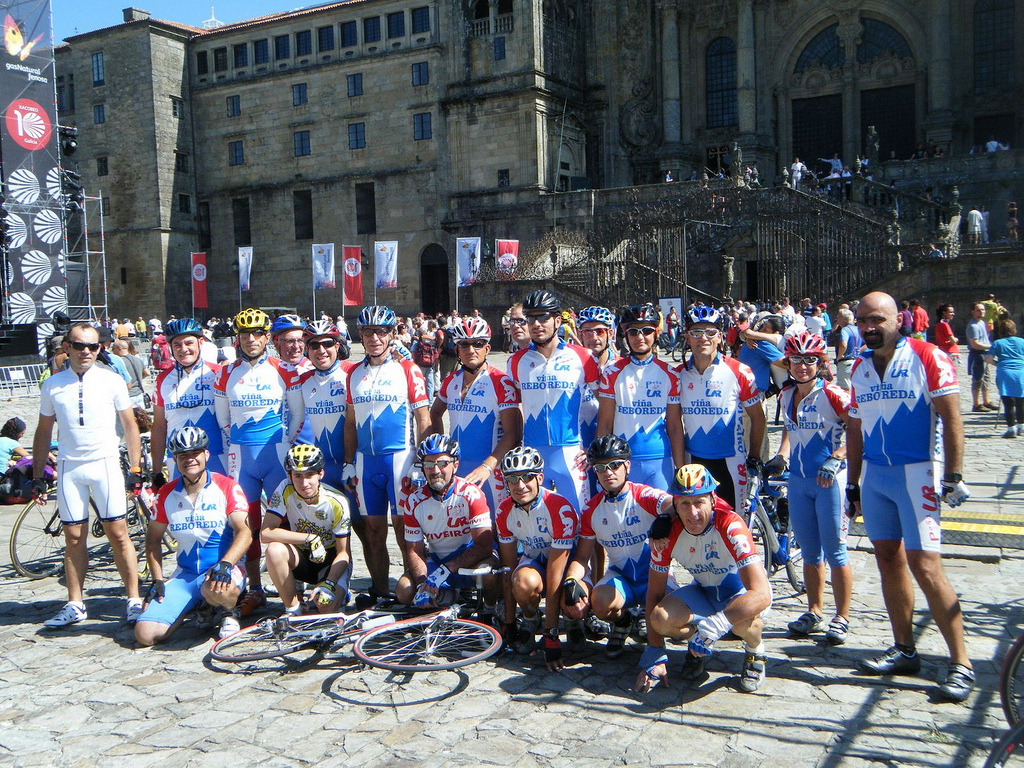 marcha a santiago 2010